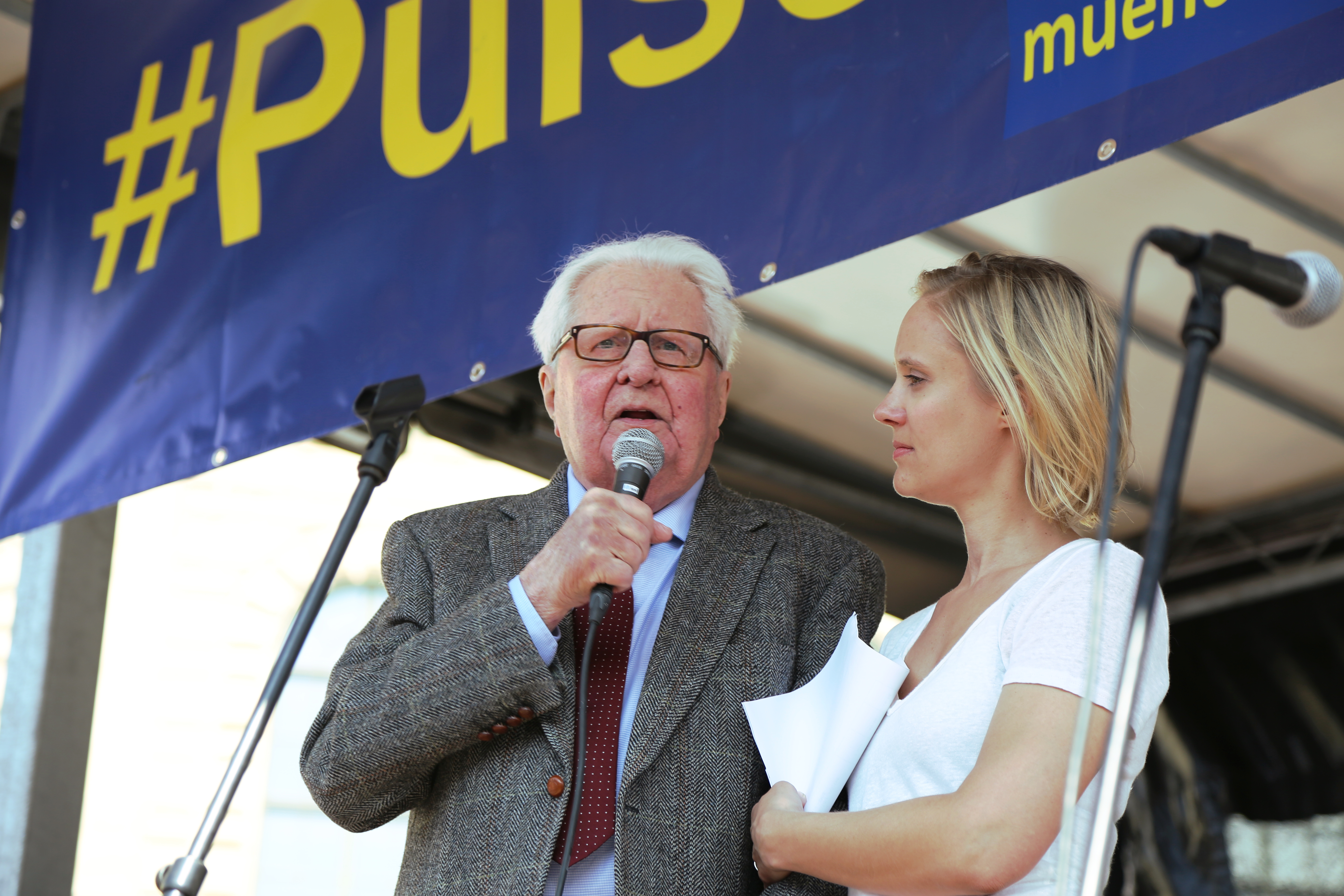 Hans-Jochen Vogel am 9. April 2017 auf der Pulse of Europe Veranstaltung in München.